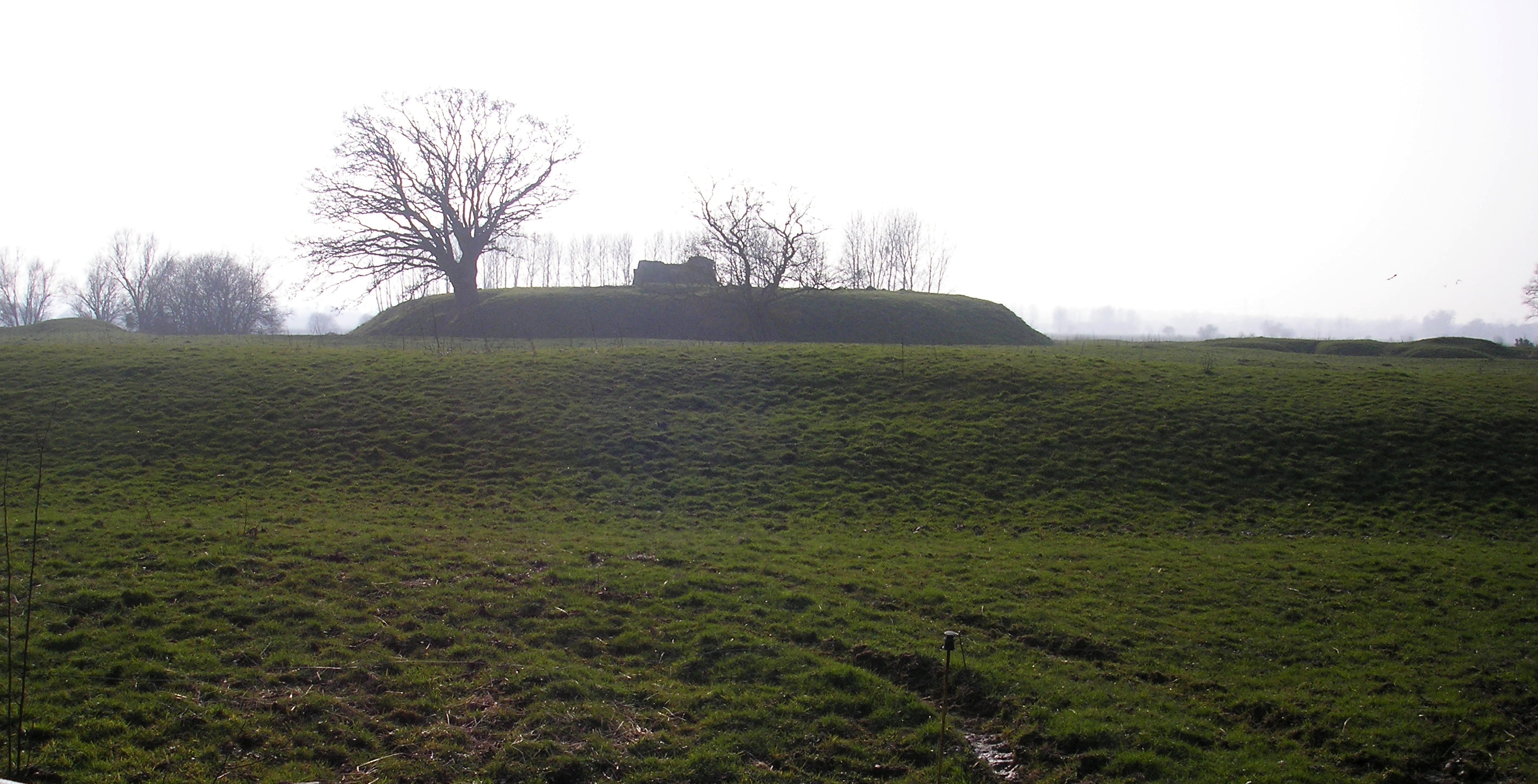 Le Mesnil-Vigot (Normandie, France). La butte Saint-Clair.